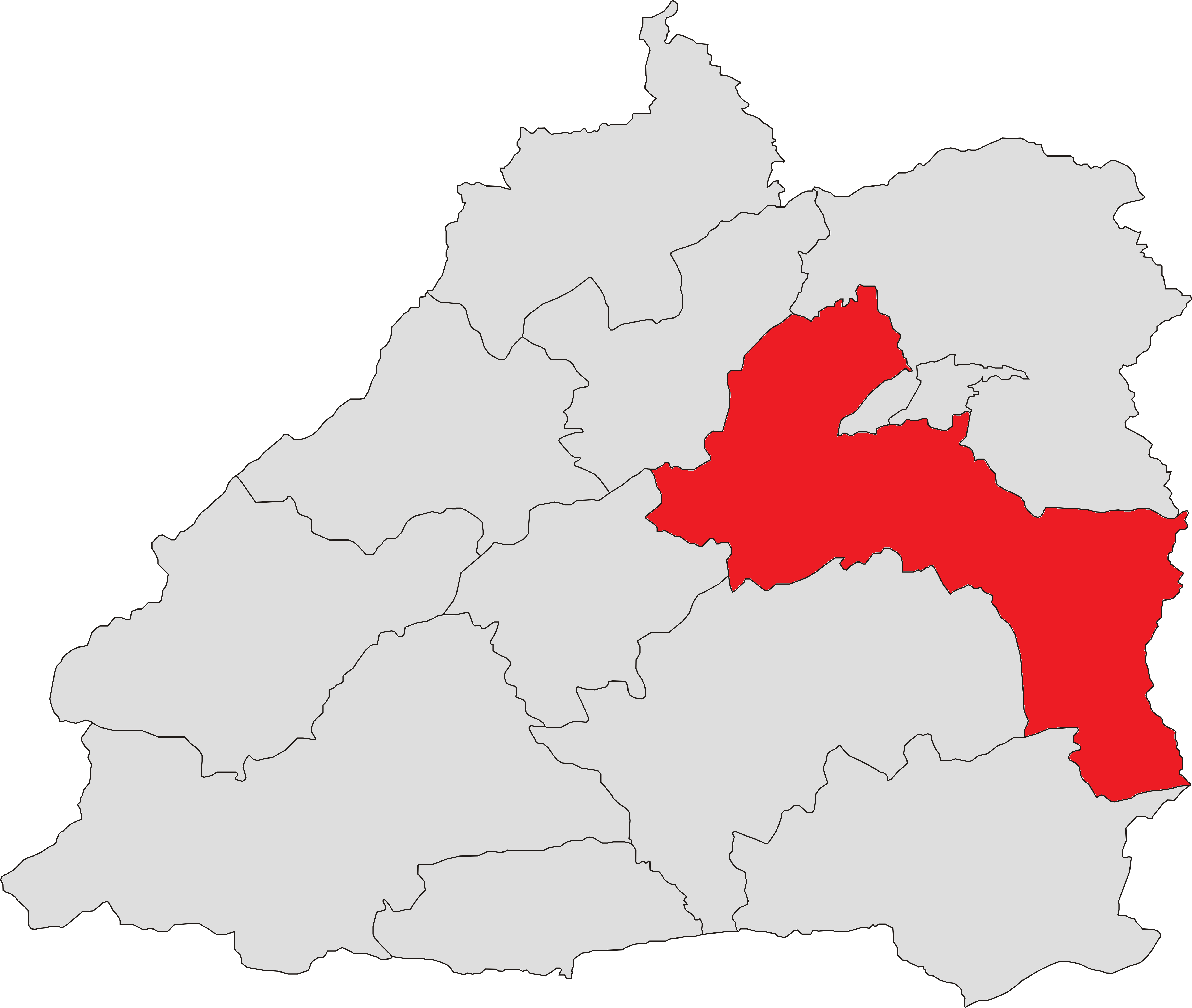 中文（中国大陆）: 芒市风平镇位置图